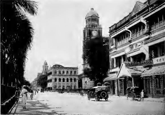 Barr Street, Rangoon